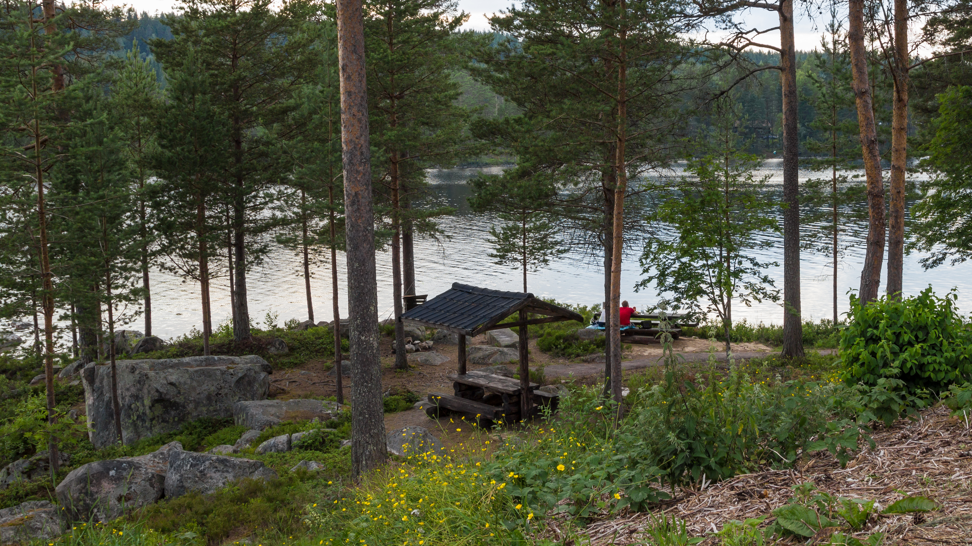 Rastplatsen vid Rällsjön, Dalarna, Sverige